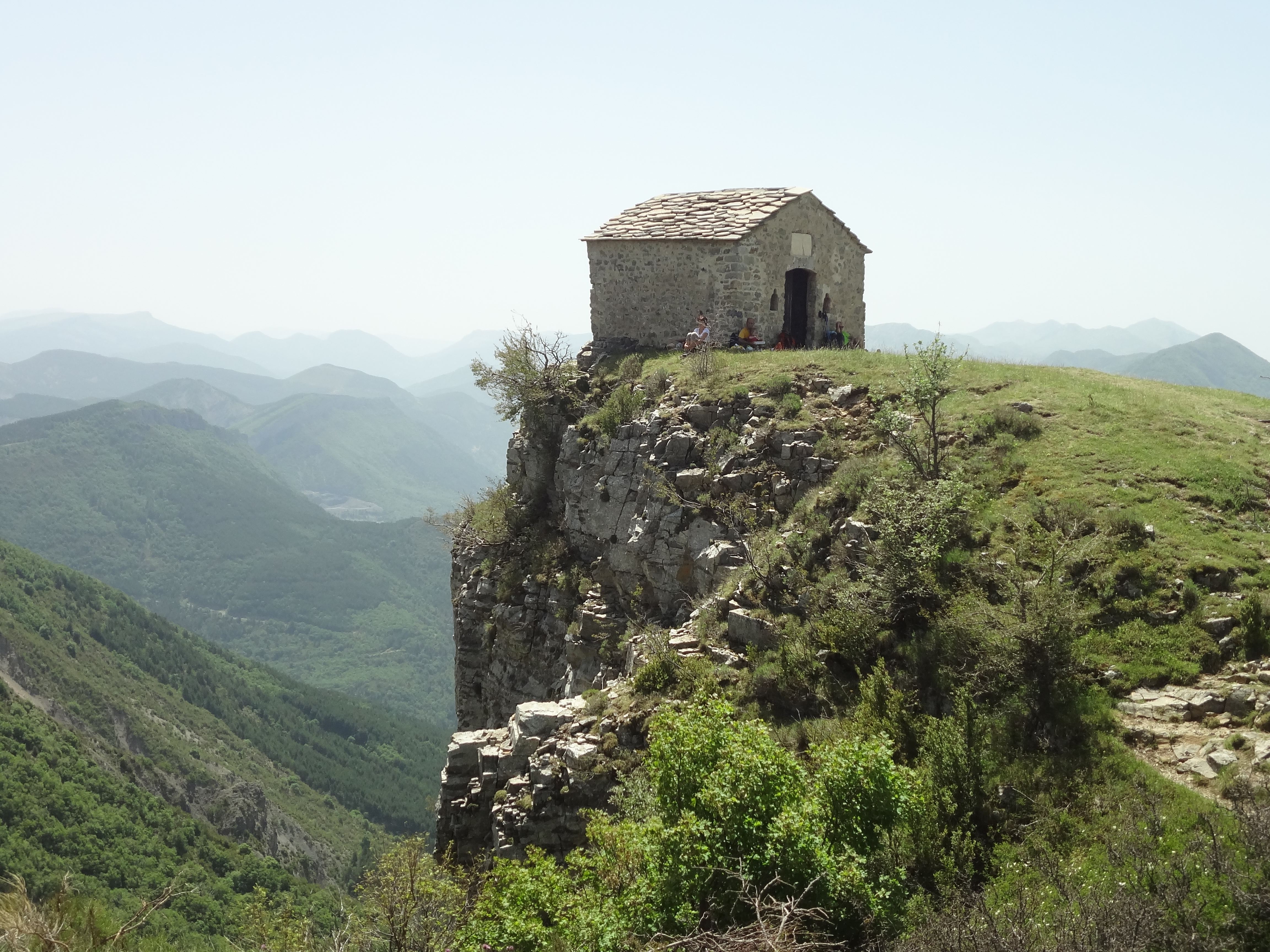 Chapelle Saint-Michel de Cousson